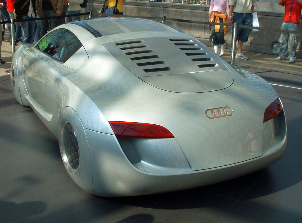 Audi RSQ